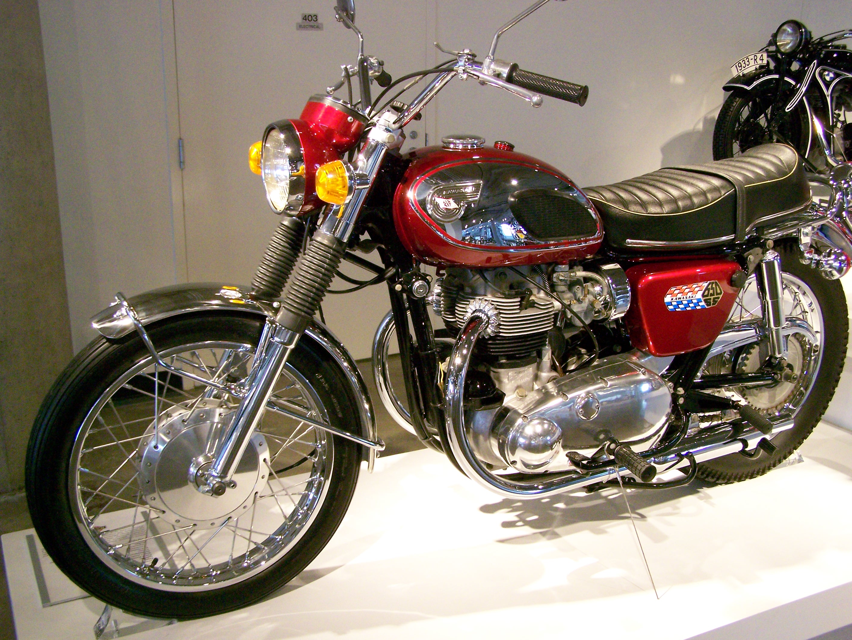 Barber Vintage Museum_203 1967 Kawasaki W1SS / More Description is here